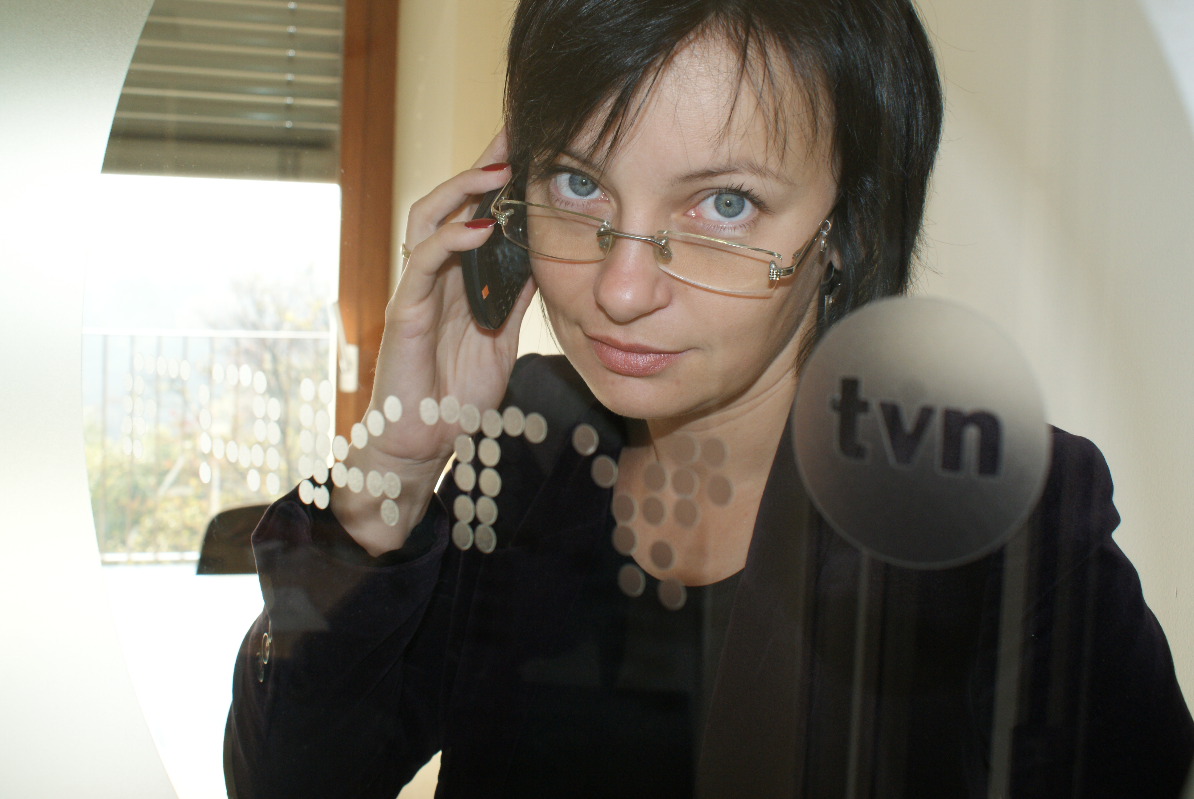 Renata Kijowska – polska dziennikarka radiowa i telewizyjna, reporterka "Faktów" TVN.